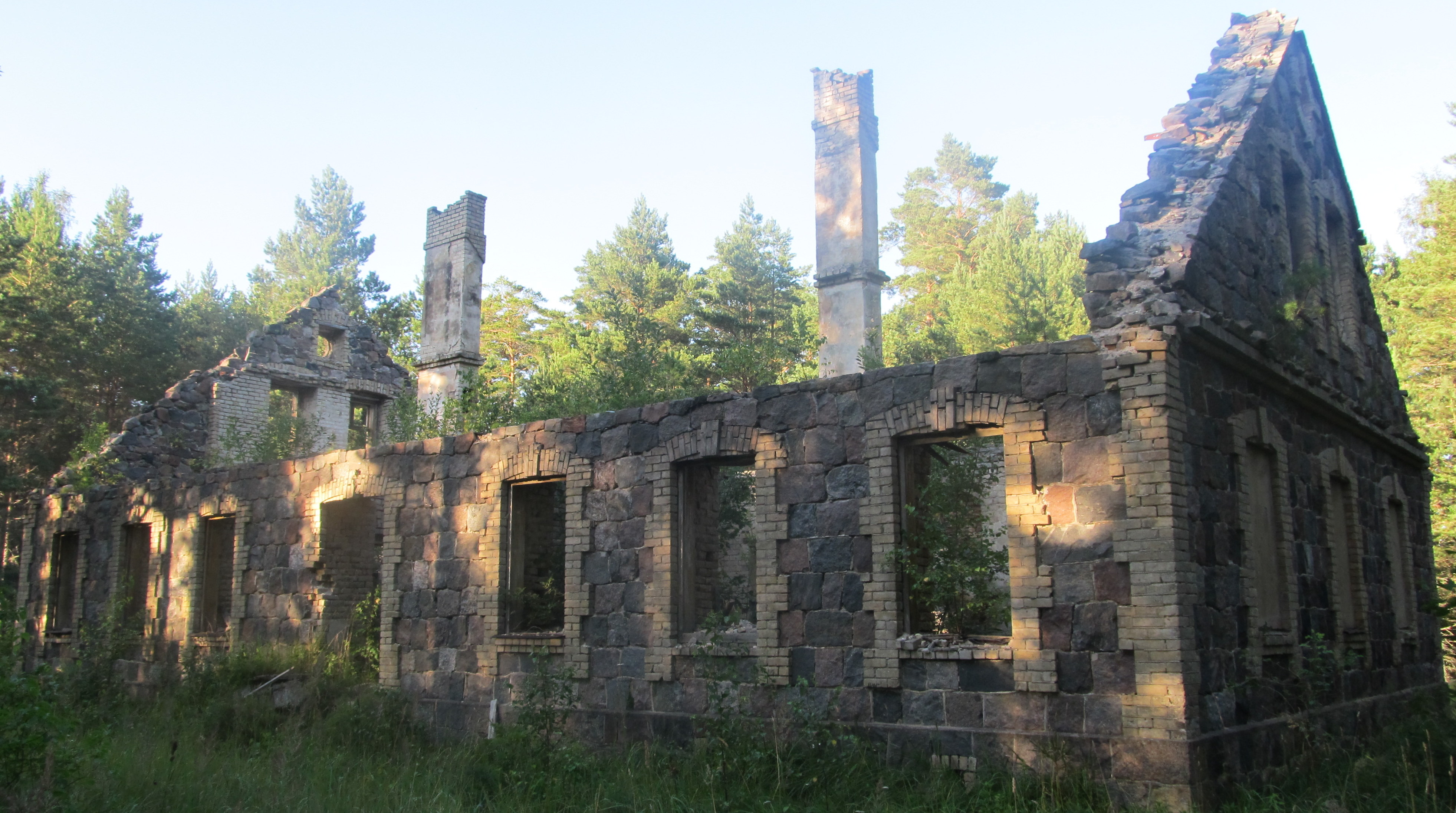 Puski õigeusu kooli varemed